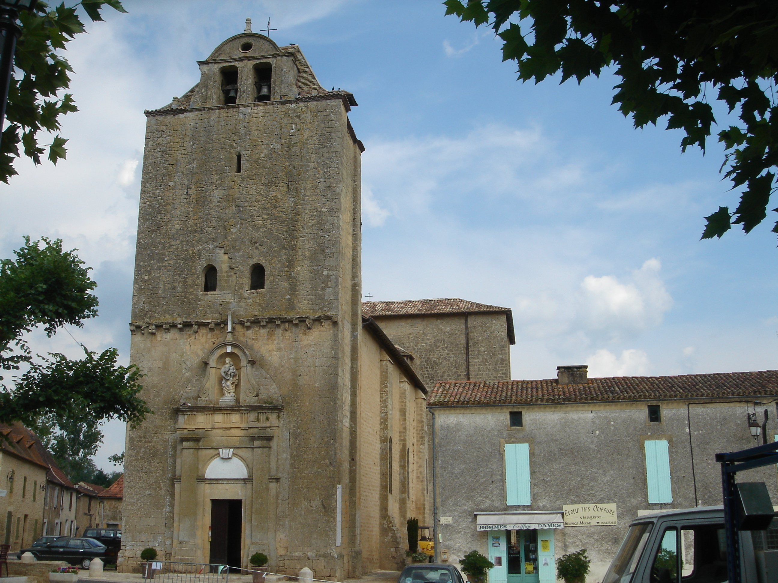 Kirche von Trémolat (24), Périgord Noir, Frankreich.